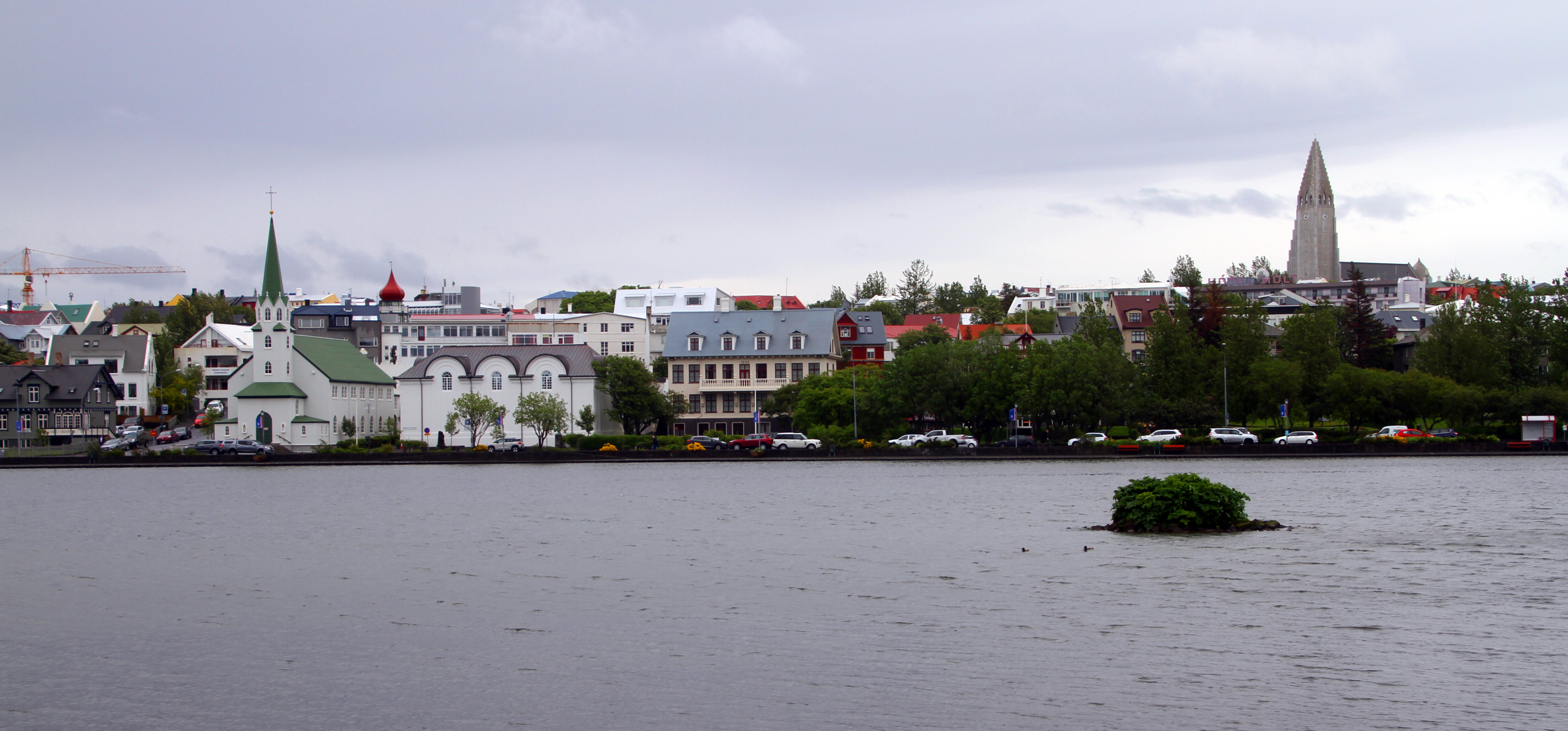 Reykjavík